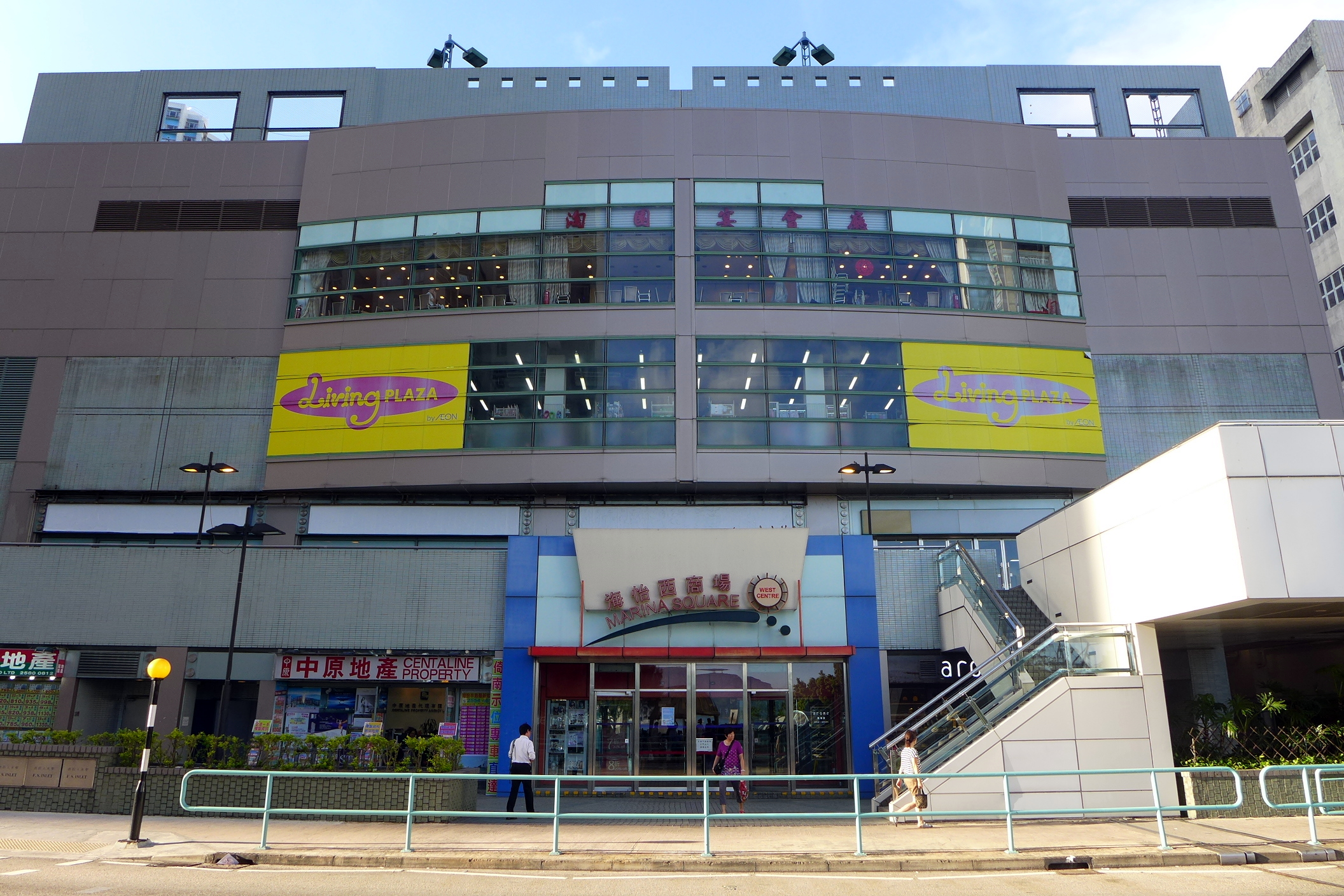 Marina Square West Outside view